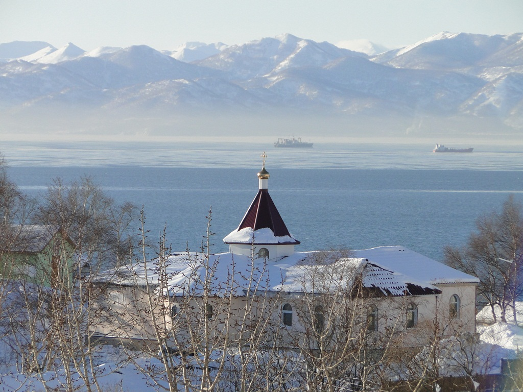 Камчатский Свято-Пантелеимонов Мужской Монастырь